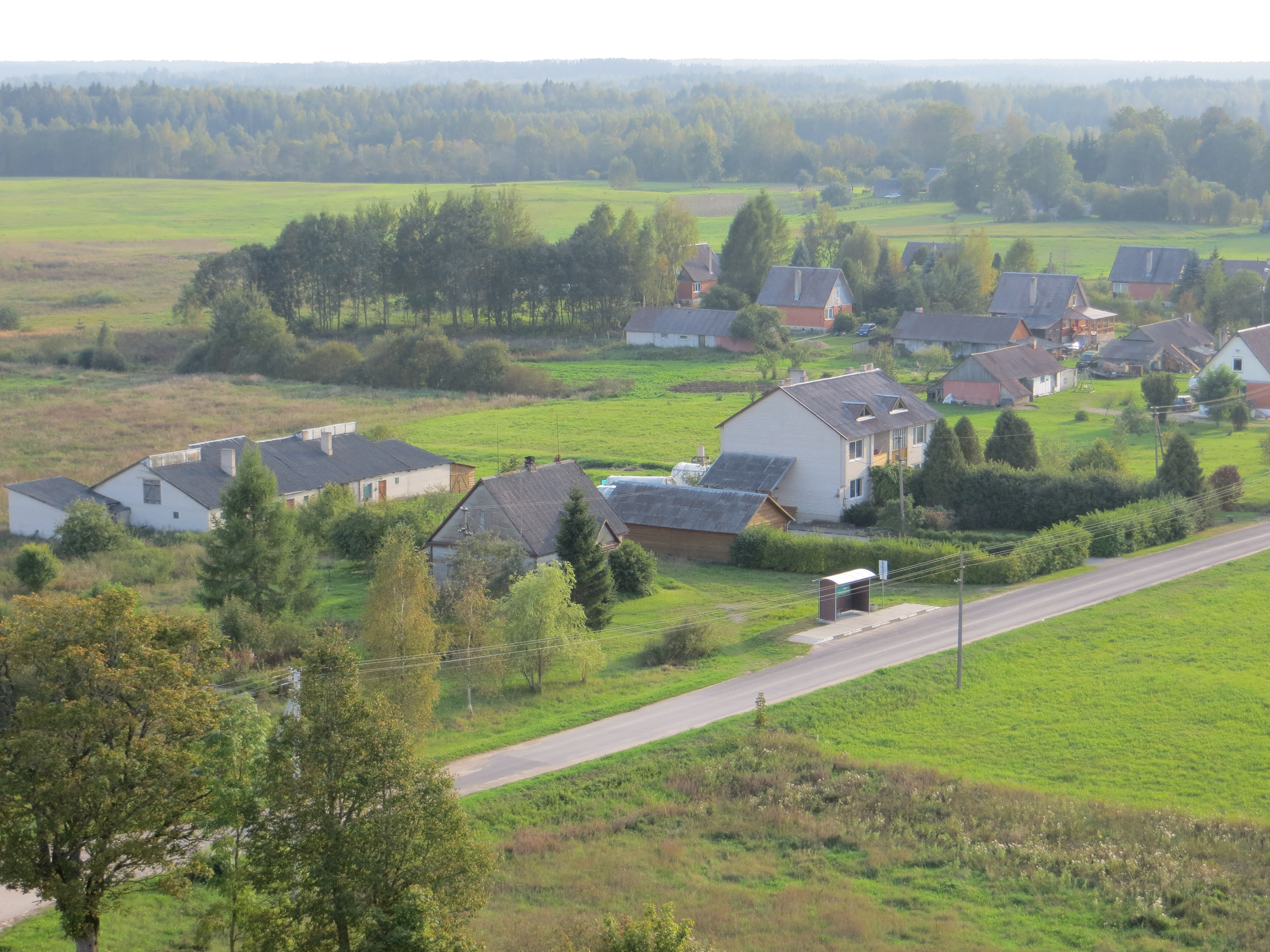 Sidabrinės, Lithuania